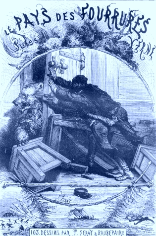 Původní ilustrace Julese Férata k francouzskému vydání knihy J. Verna